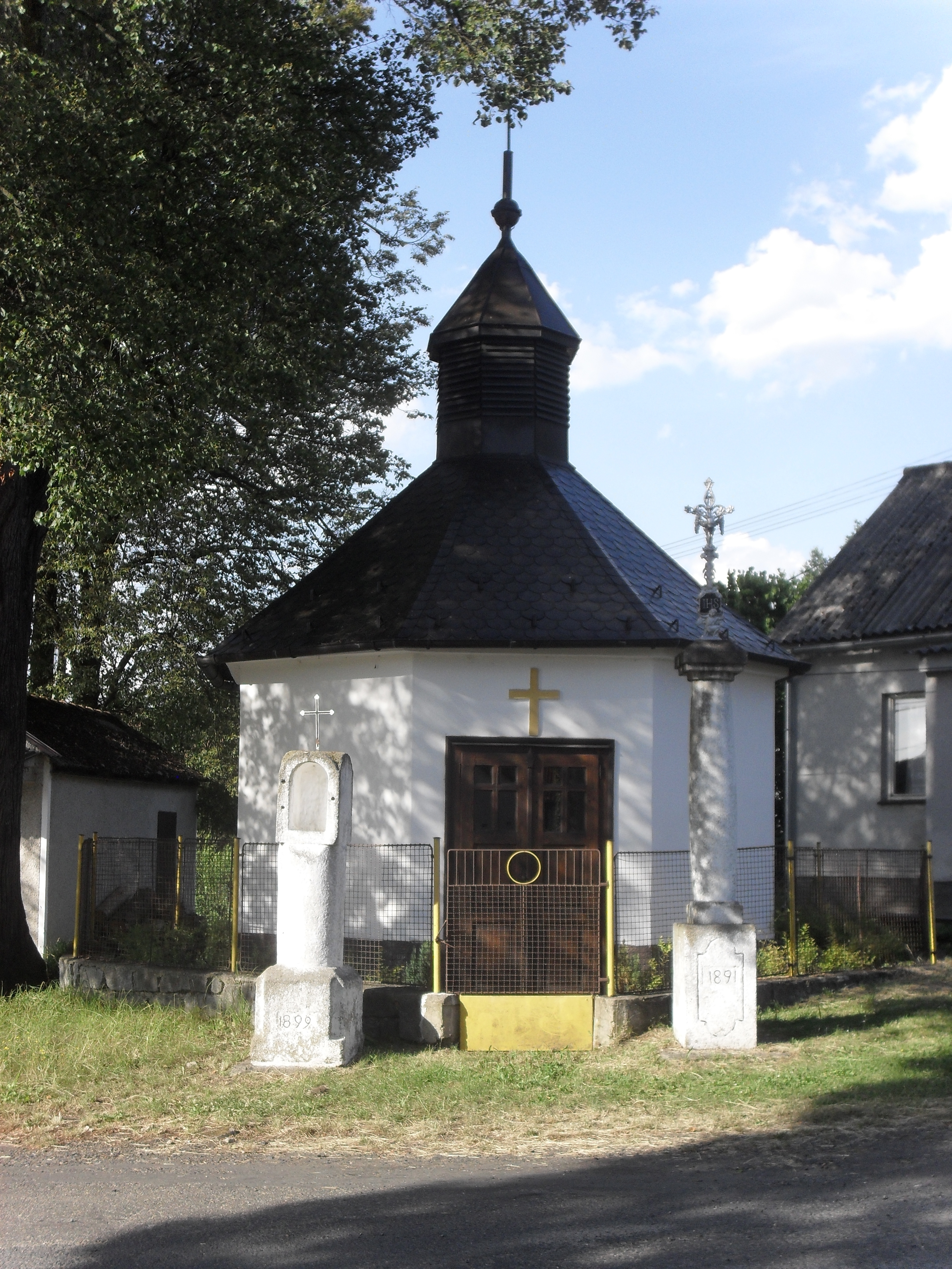 Fotografie pořízena v Klatovské obci Strážovice u Pačejova.